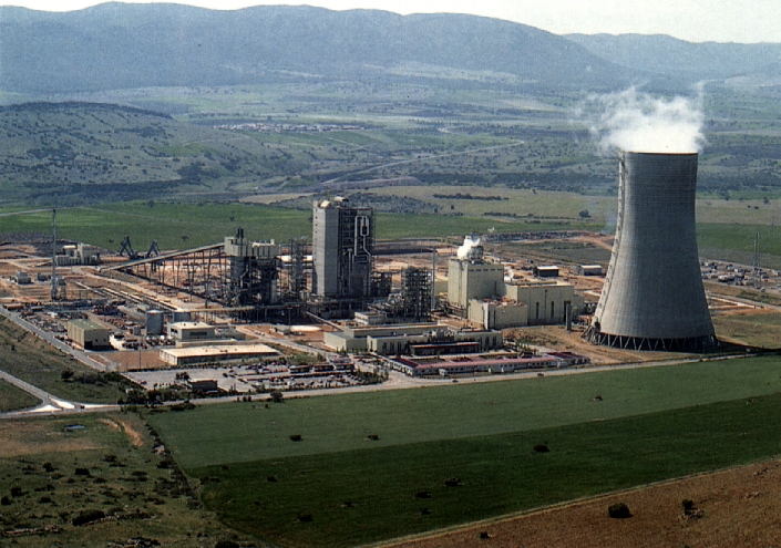 Central de Elcogas en Puertollano (Ciudad Real). Es una Central de 335 MW brutos (en condiciones ISO), cuyo sistema productivo se basa en la tecnología de gasificación de carbón integrada en un ciclo combinado, con unas características medioambientales modélicas, reduciendo las emisiones atmosféricas por debajo de lo establecido en la legislación vigente.